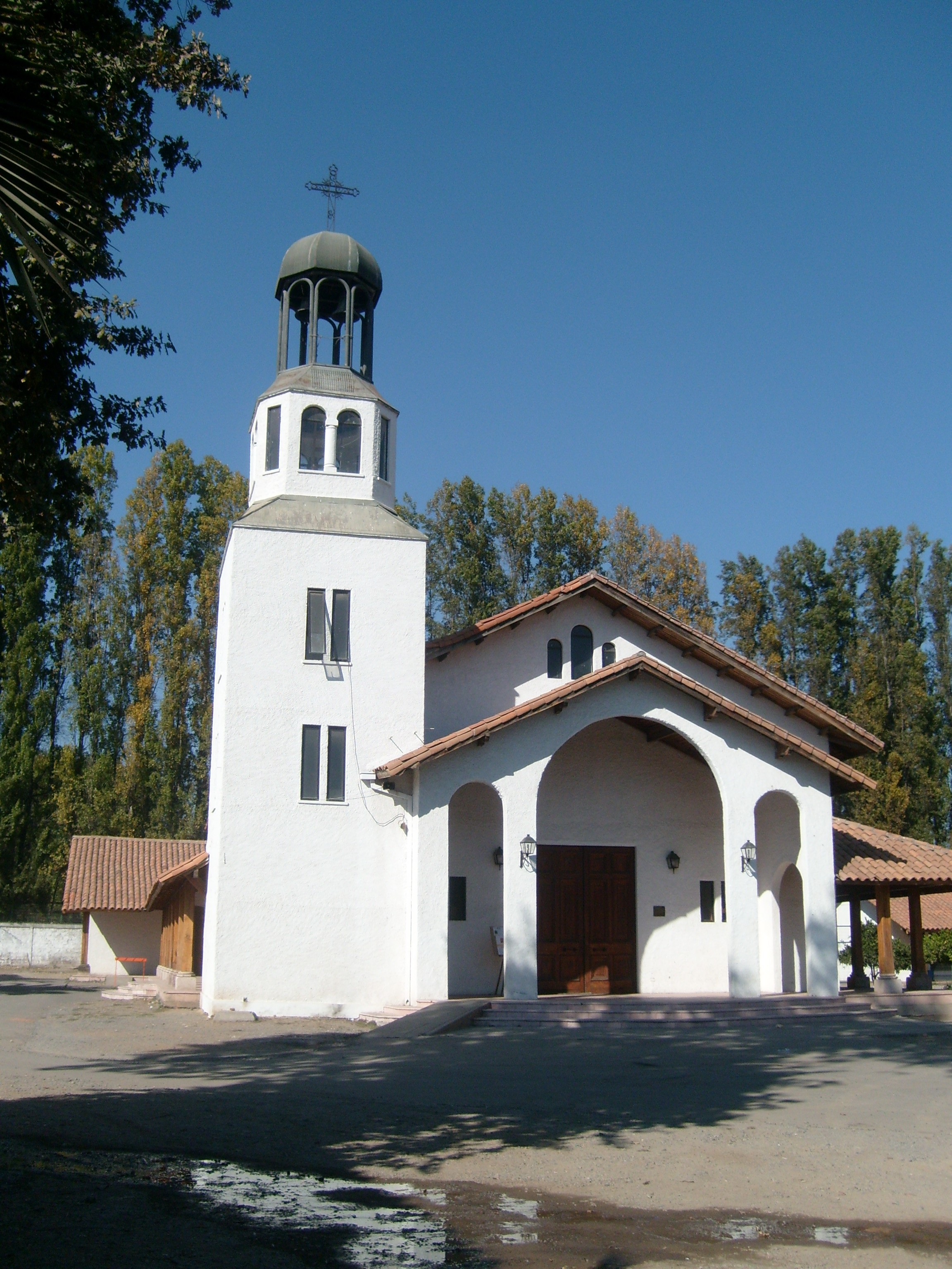 Niño de Dios Malloco's church